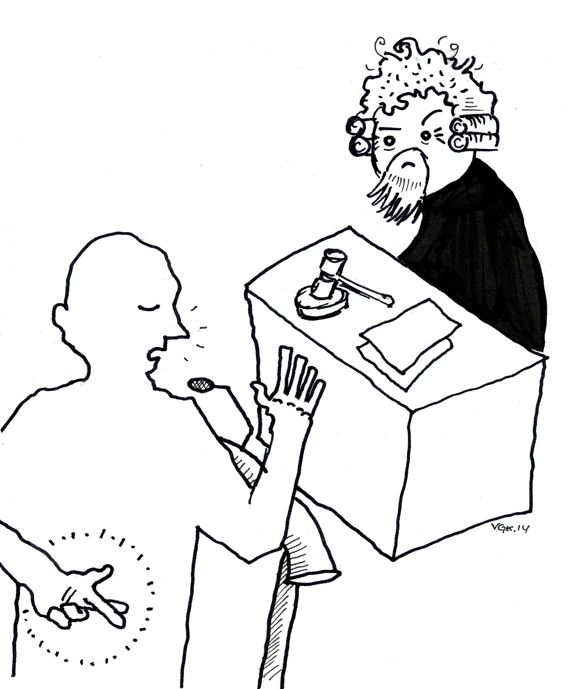 Langefinger over pekefinger, eller "jugekors", er et typisk symbol på løgn.